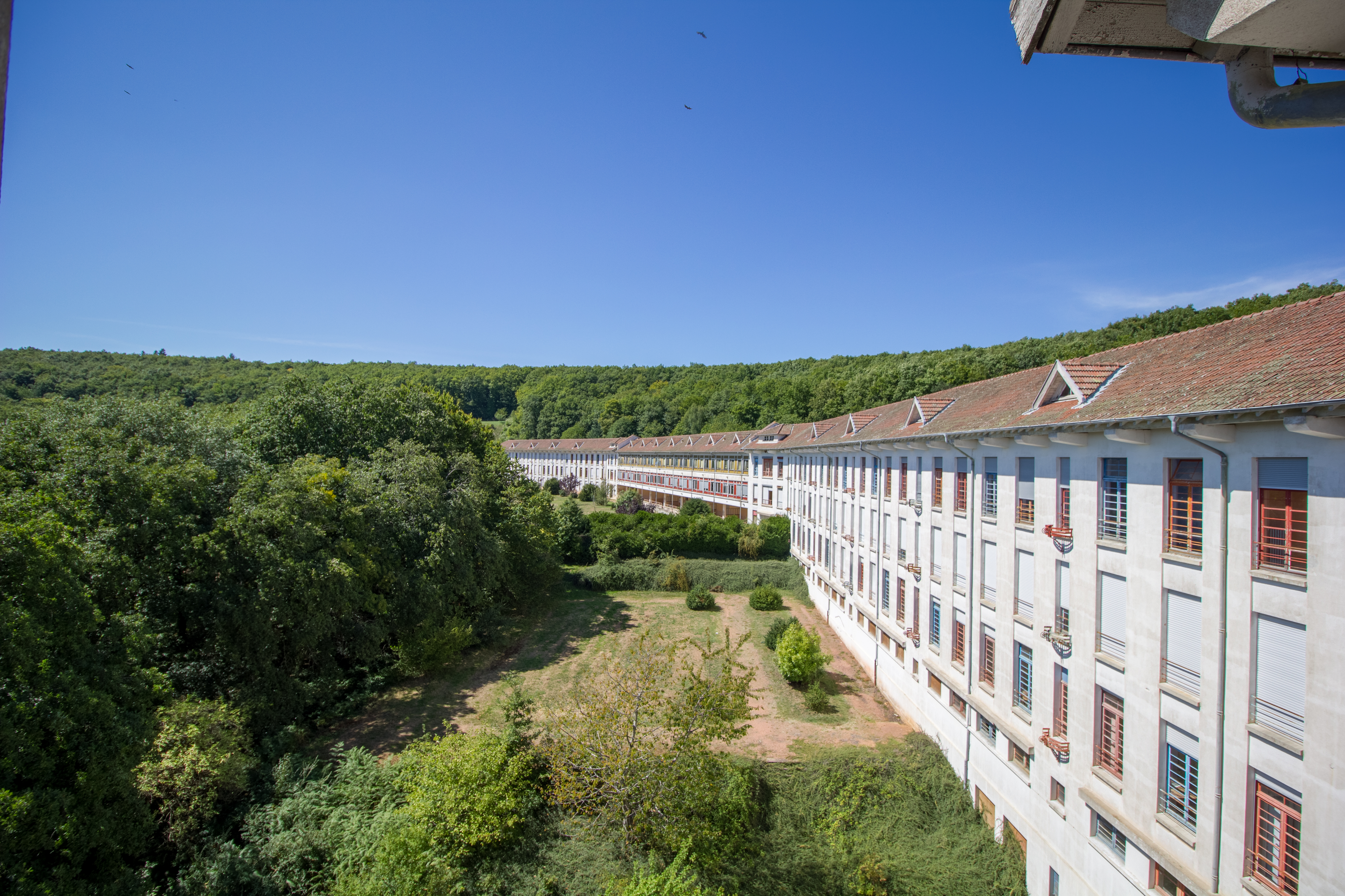 La facade sud du sanatorium, vue du haut de l'escalier central.